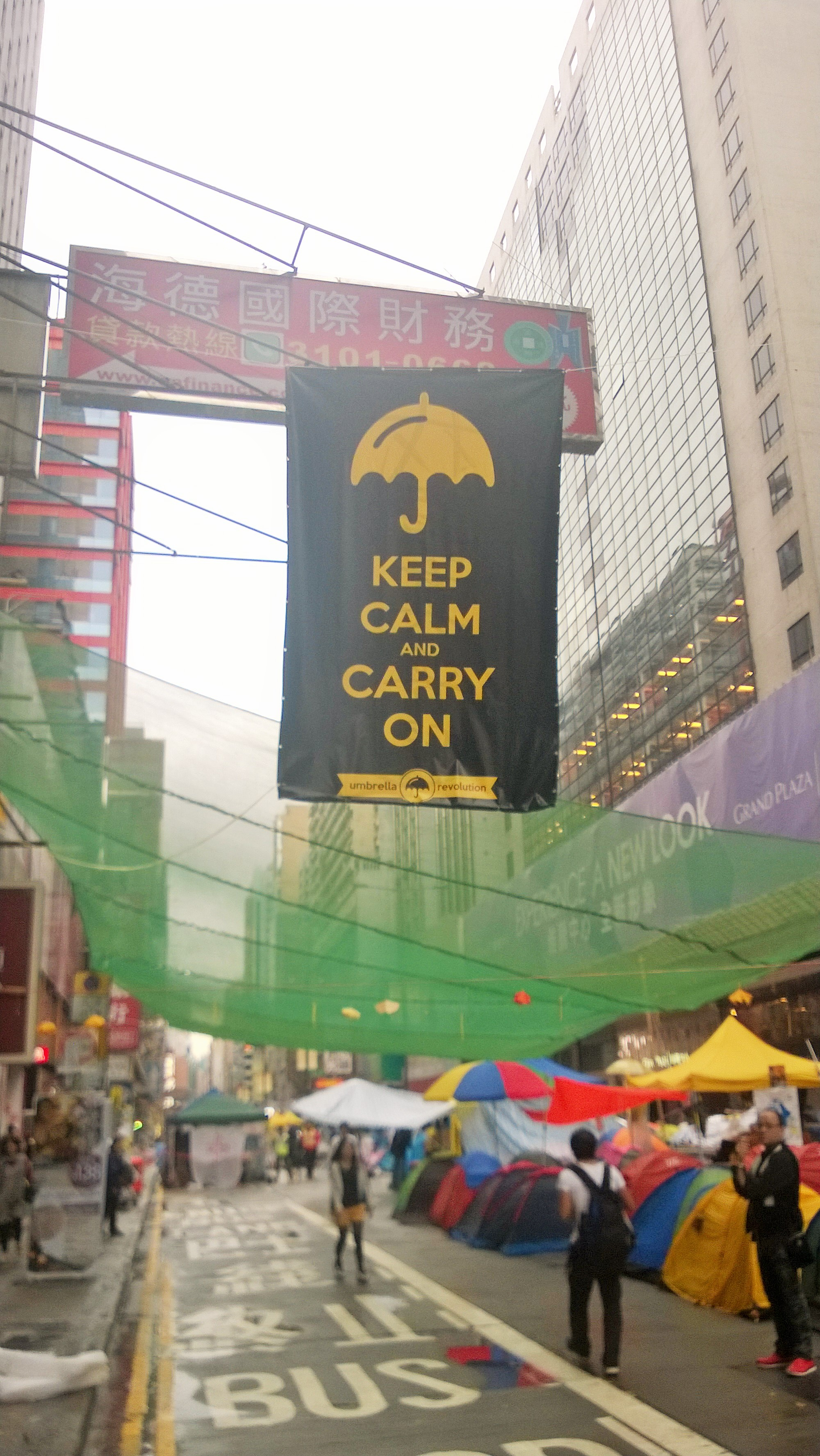 Mong Kok Nathan Road Gauze